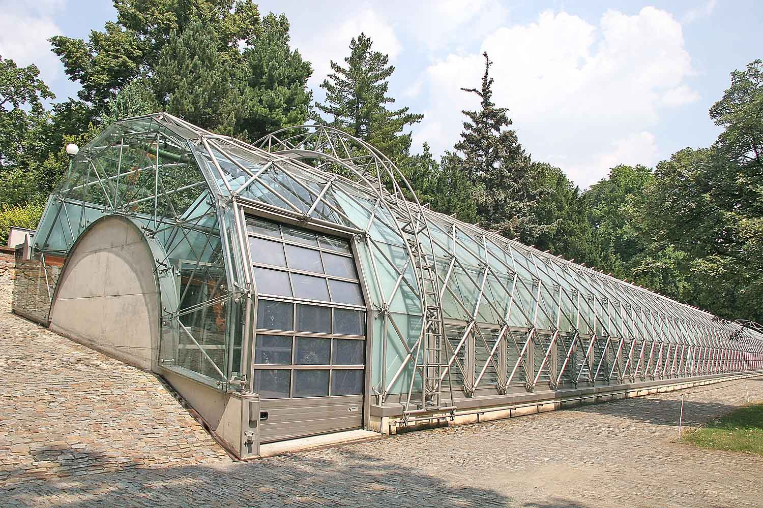 Královská zahrada, Oranžerie, Prague Castle